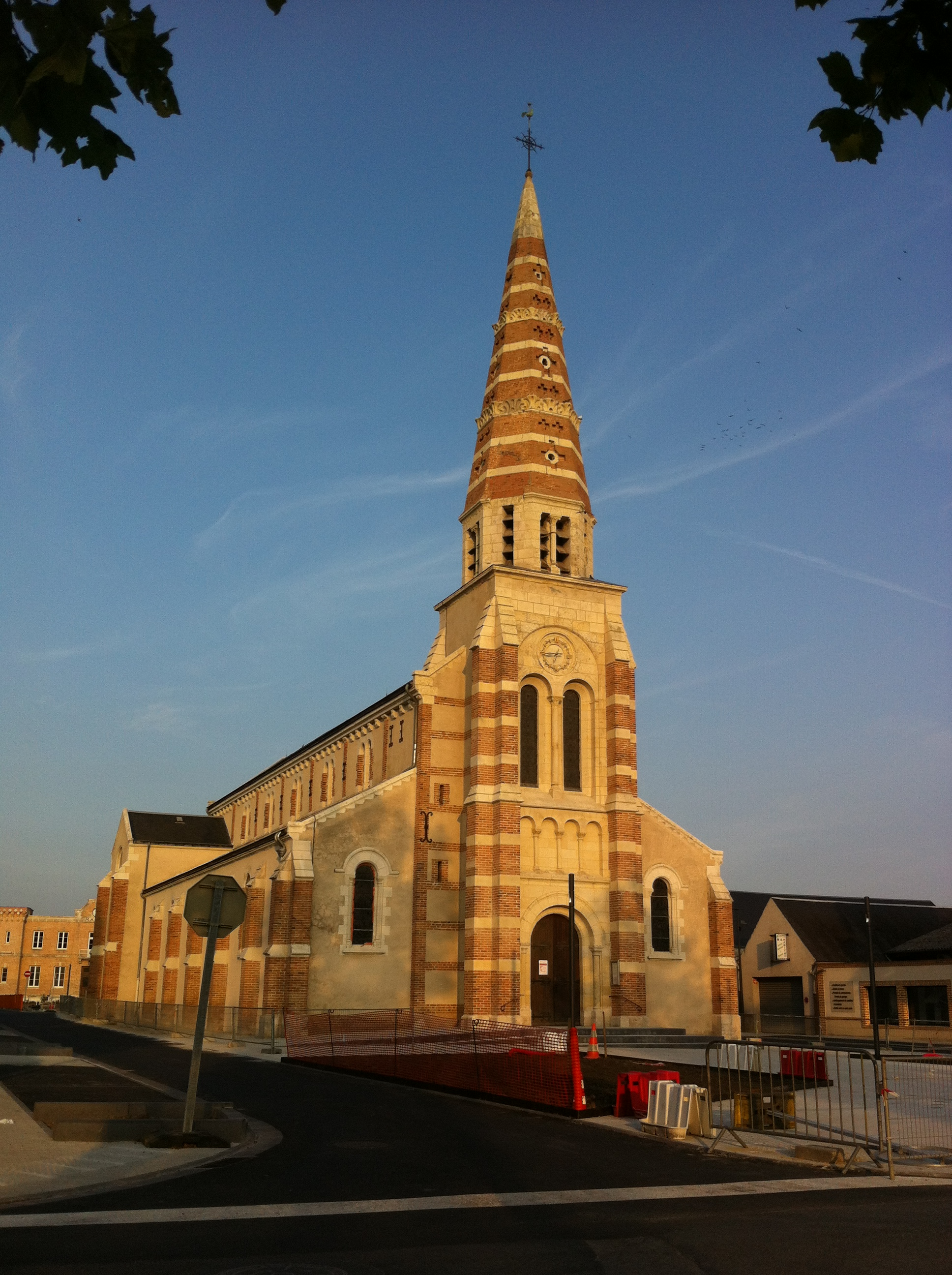 L'église Sainte-Anne de Lamotte-Beuvron rénovée.